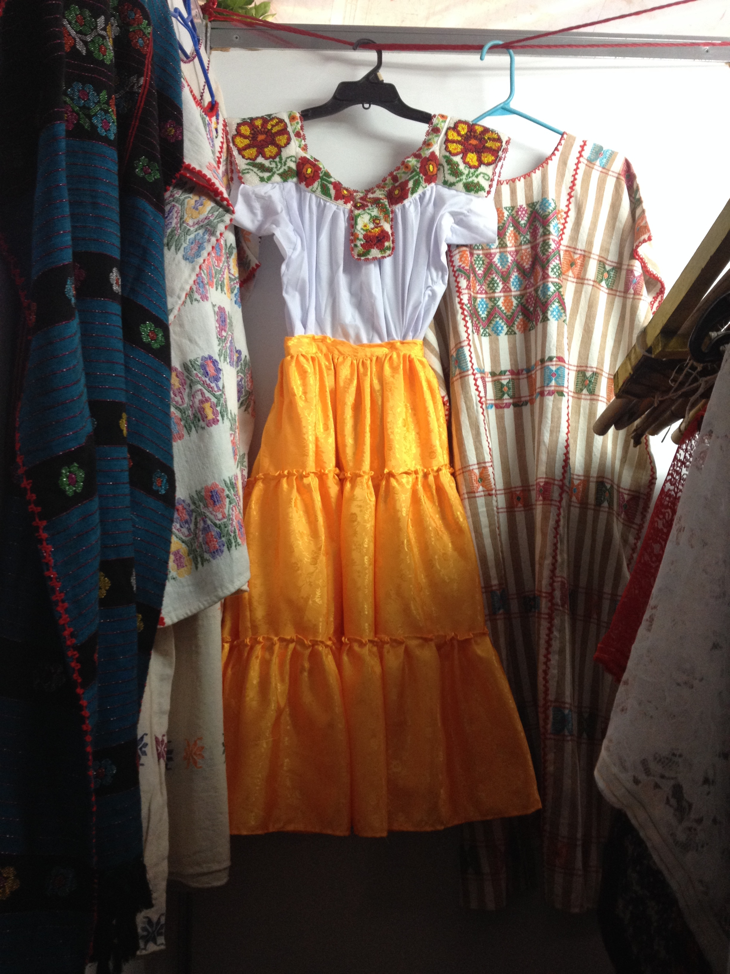 Traje típico de Ometepec, estado de Guerrero, México